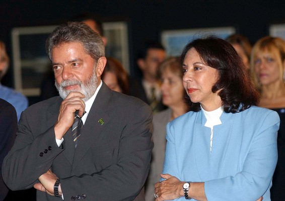 Presidente Luiz Inácio Lula da Silva e a governadora do Distrito Federal, Maria de Lourdes Abadia, na cerimônia de inscrição de Santos Dumont como herói da pátria em 2006.